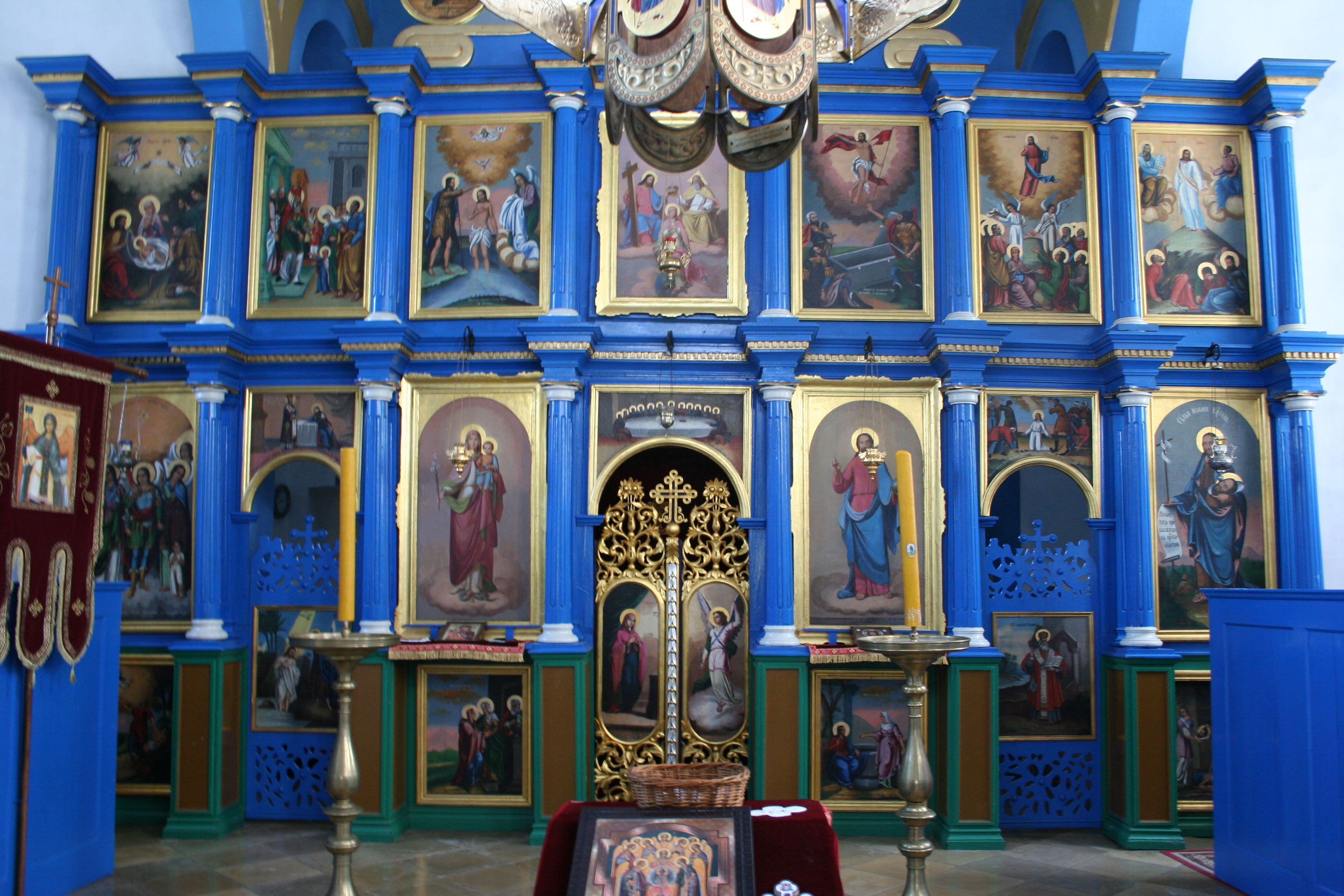 Ikonostas crkve, Brankovina